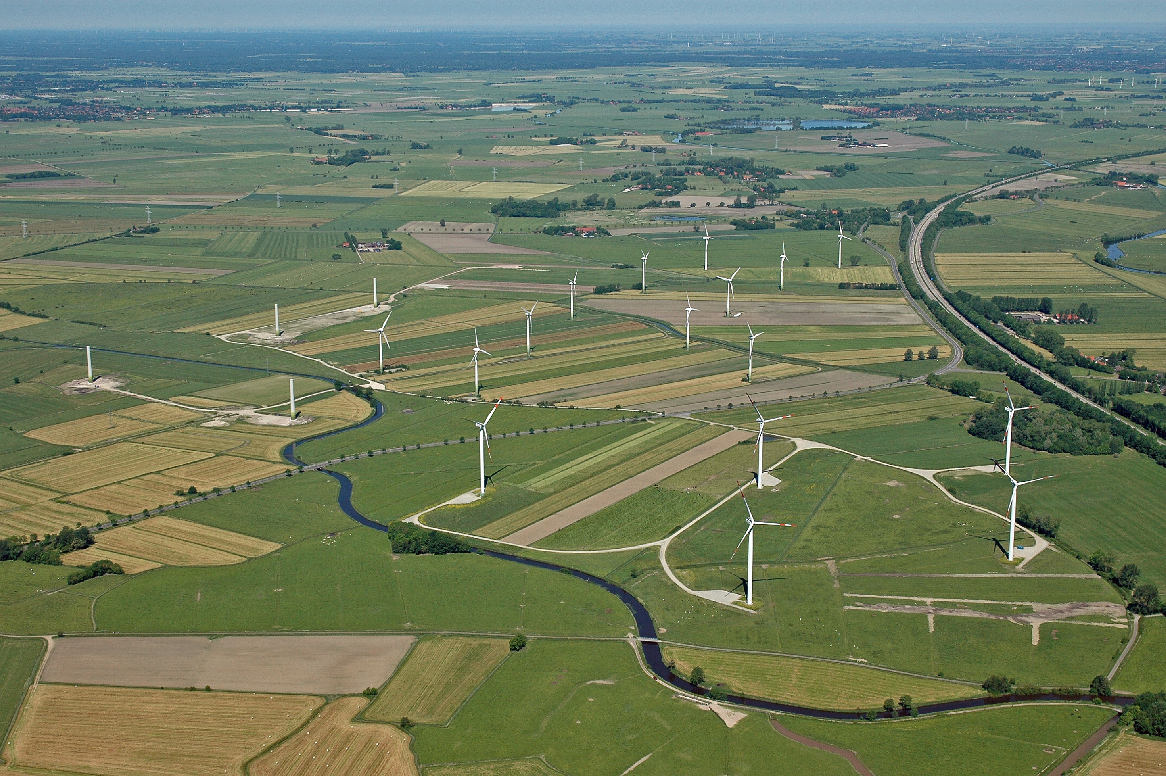 Fotoflug vom Flugplatz Nordholz-Spieka über Cuxhaven und Wilhelmshaven